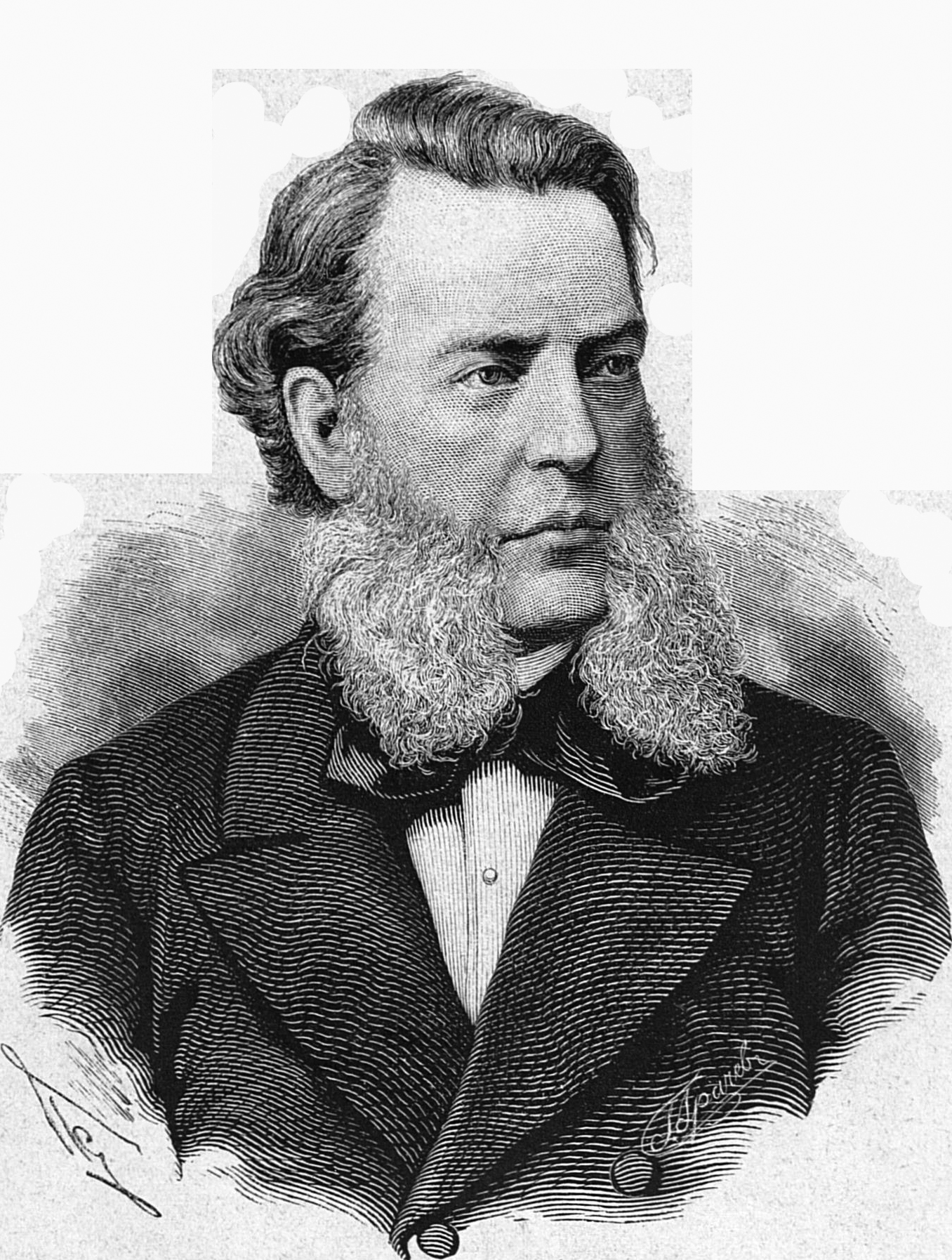 Гедеонов Степан Александрович, искусствовед